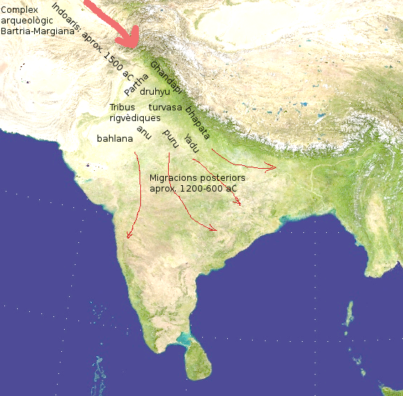 Migracions vèdiques 2000 aC